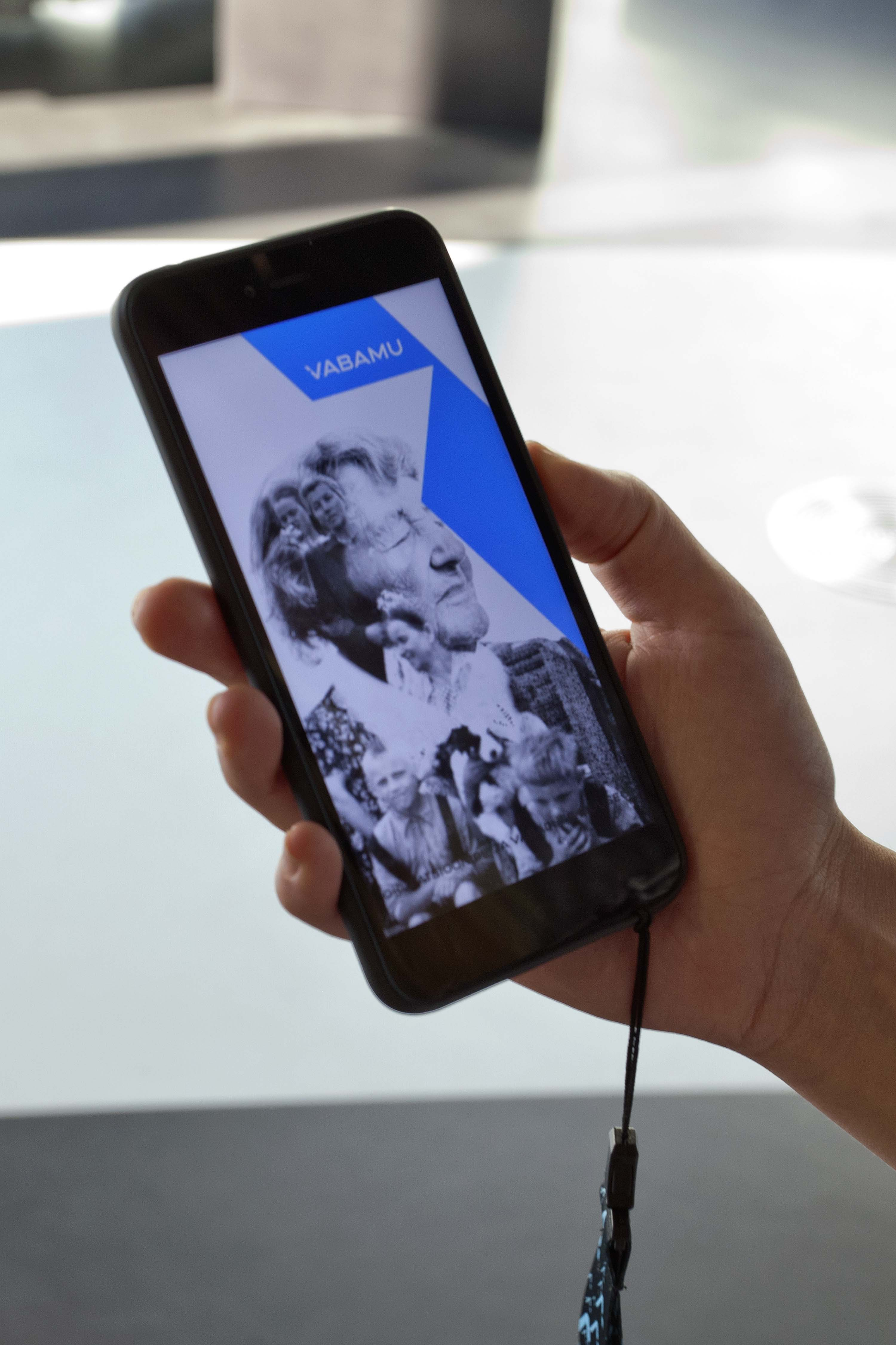 Vabamu e-giid